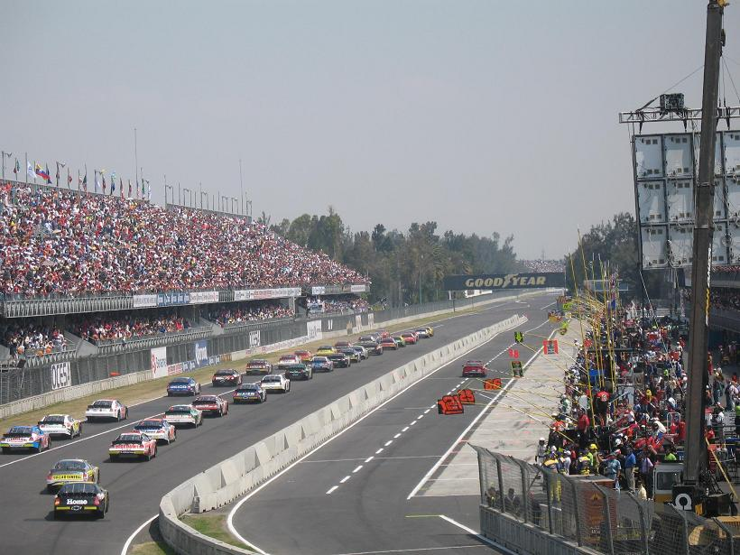 Autodromo Hermanos Rodriguez, Mexico City, MEXICO Photo by (WT-en) Fabz 21:30, 5 April 2007 (EDT)